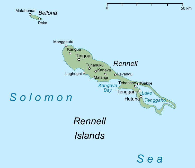 Karte der Inseln Rennell und Bellona, sowie der Indispensable Reefs im Süden der Salomonen